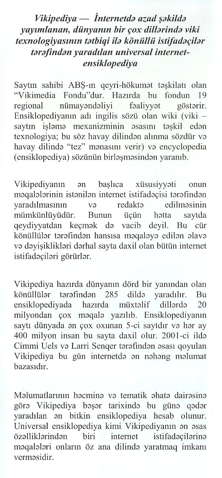 Vikipediya-Azərbaycan İB-nin ilk bukleti